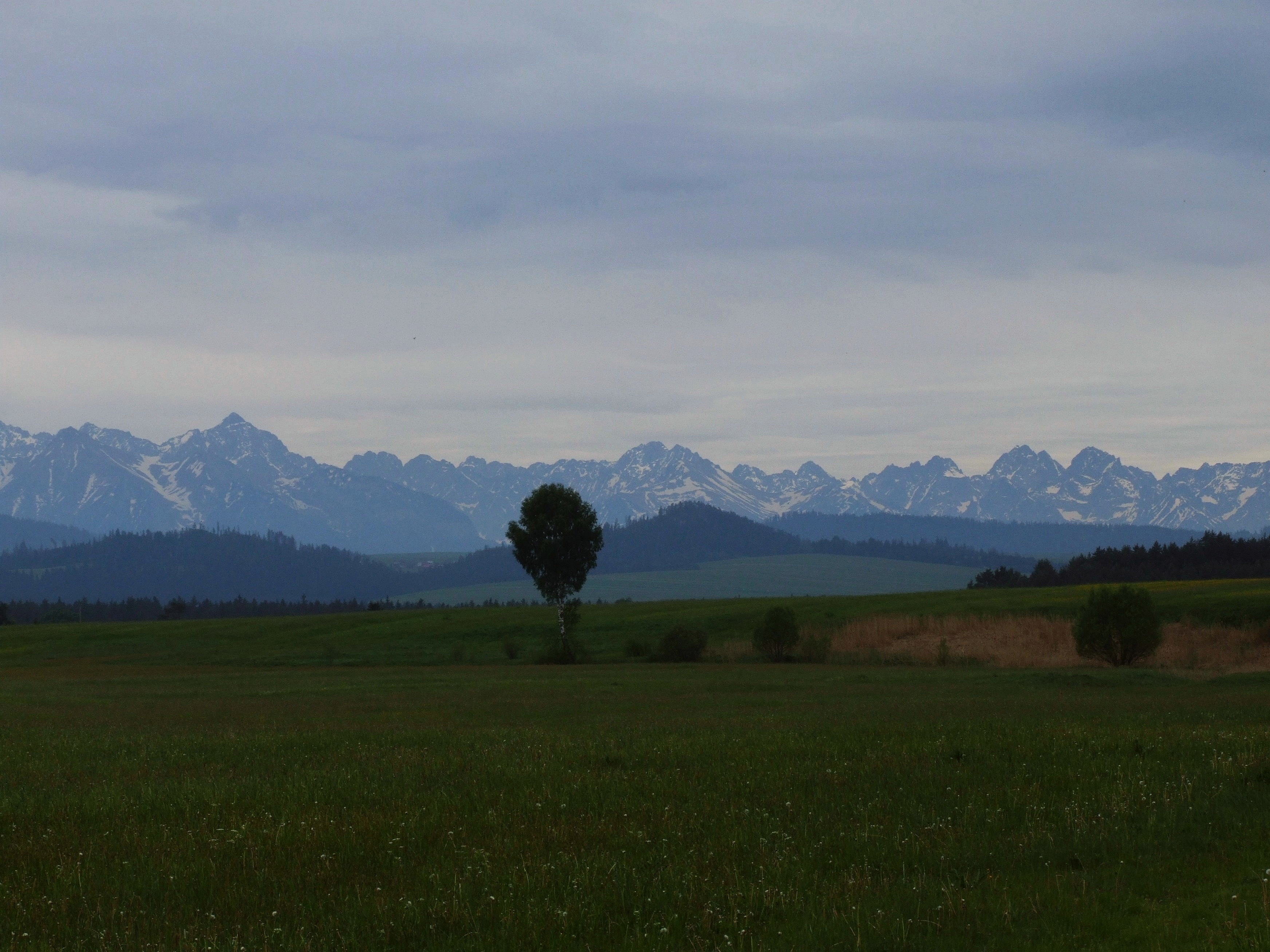 Kotlina Orawsko-Nowotarska w okolicy Krempach. Widoczne Pieniny Spiskie i Tatry